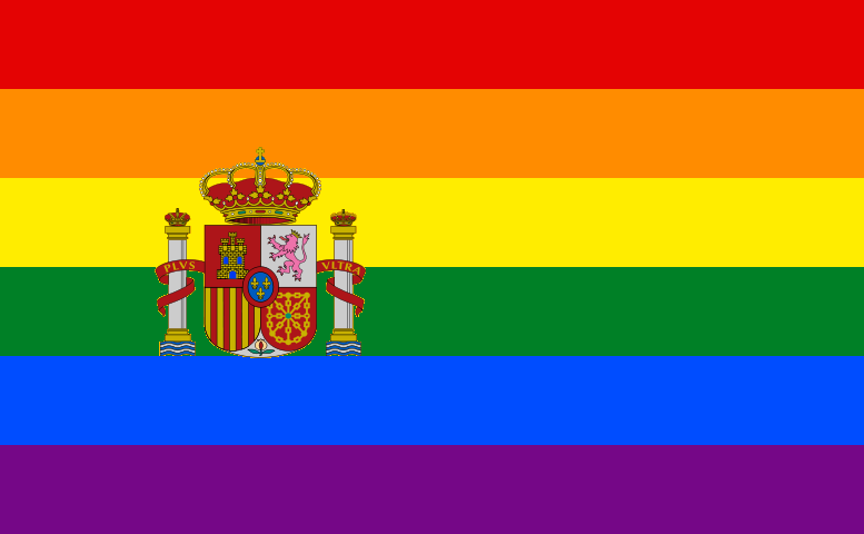 Bandera gay España